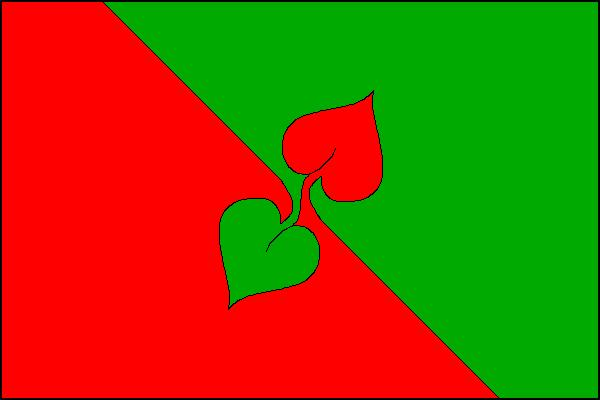 Vlajka obce Lipová v okrese Děčín